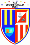 Simbolo